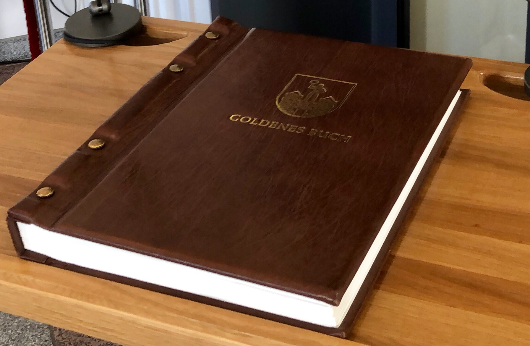 Goldenes Buch der Stadt Magdeburg, wohl dritter Band